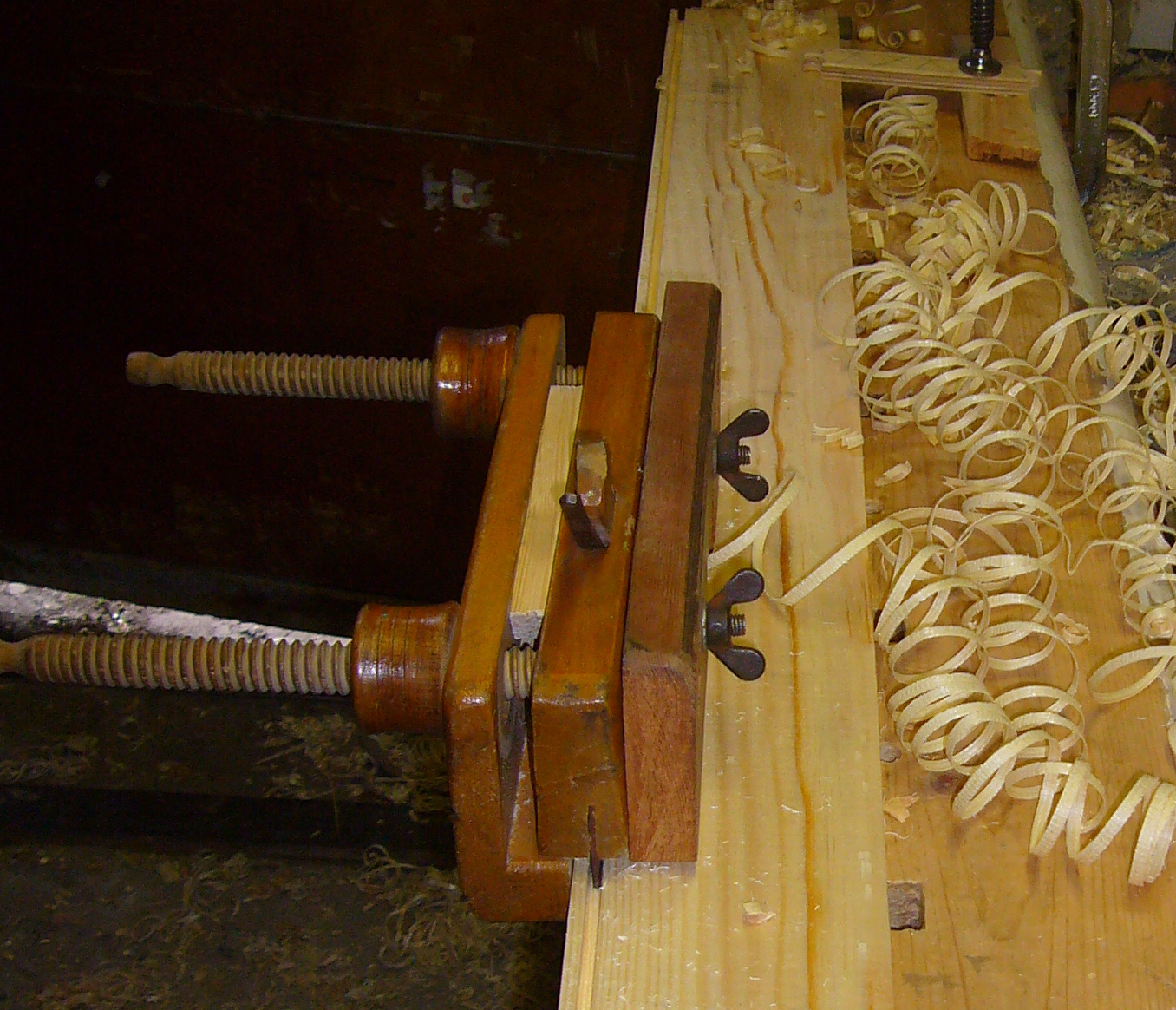 Работа рубанком-шпунтубелем с боковым упором и упором глубины - выстрагивание паза